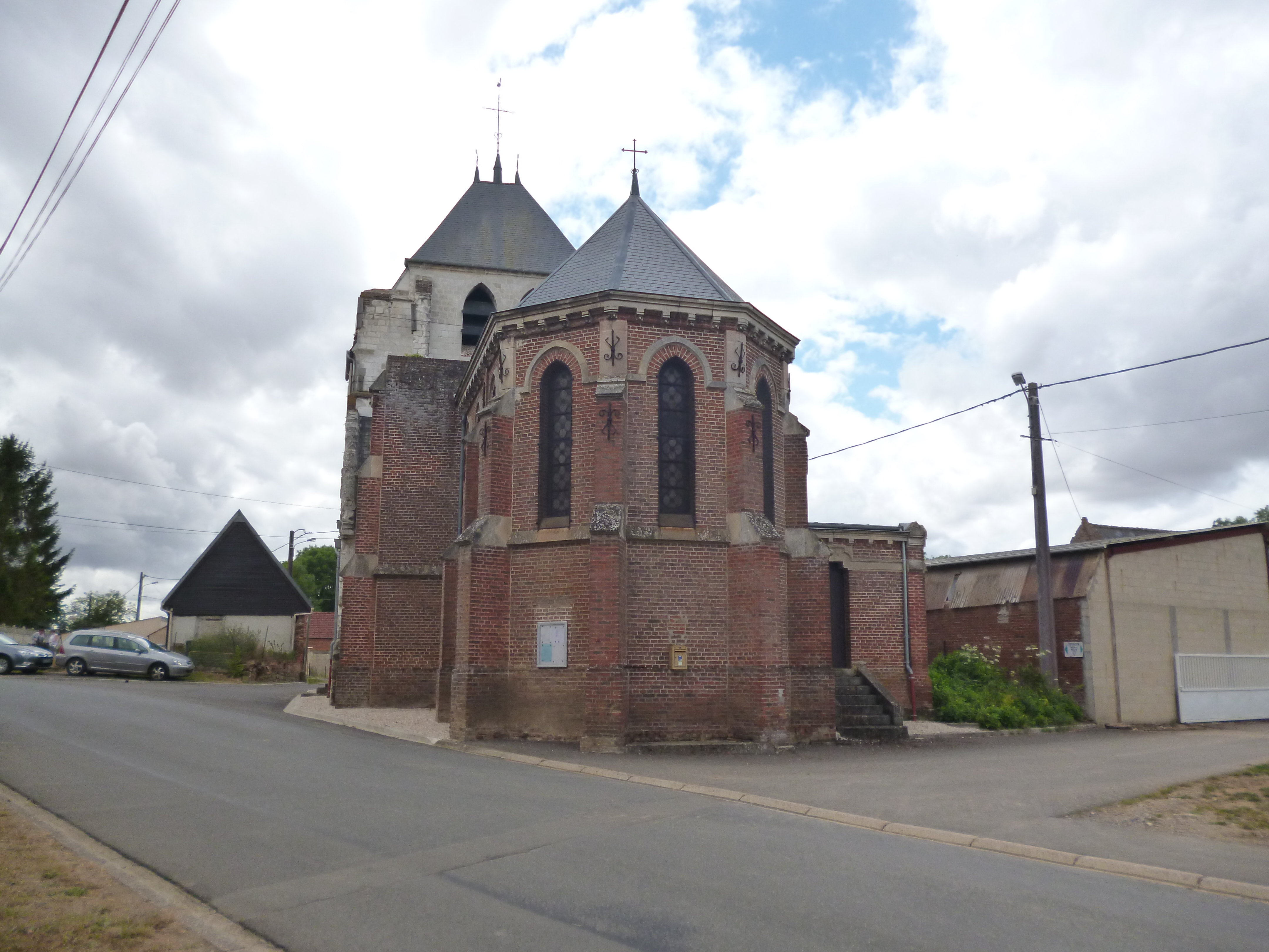 Eglise Saint-Marc de Mory-Montcrux (Oise).